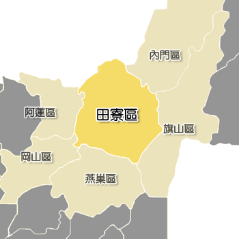 田寮區相對位置